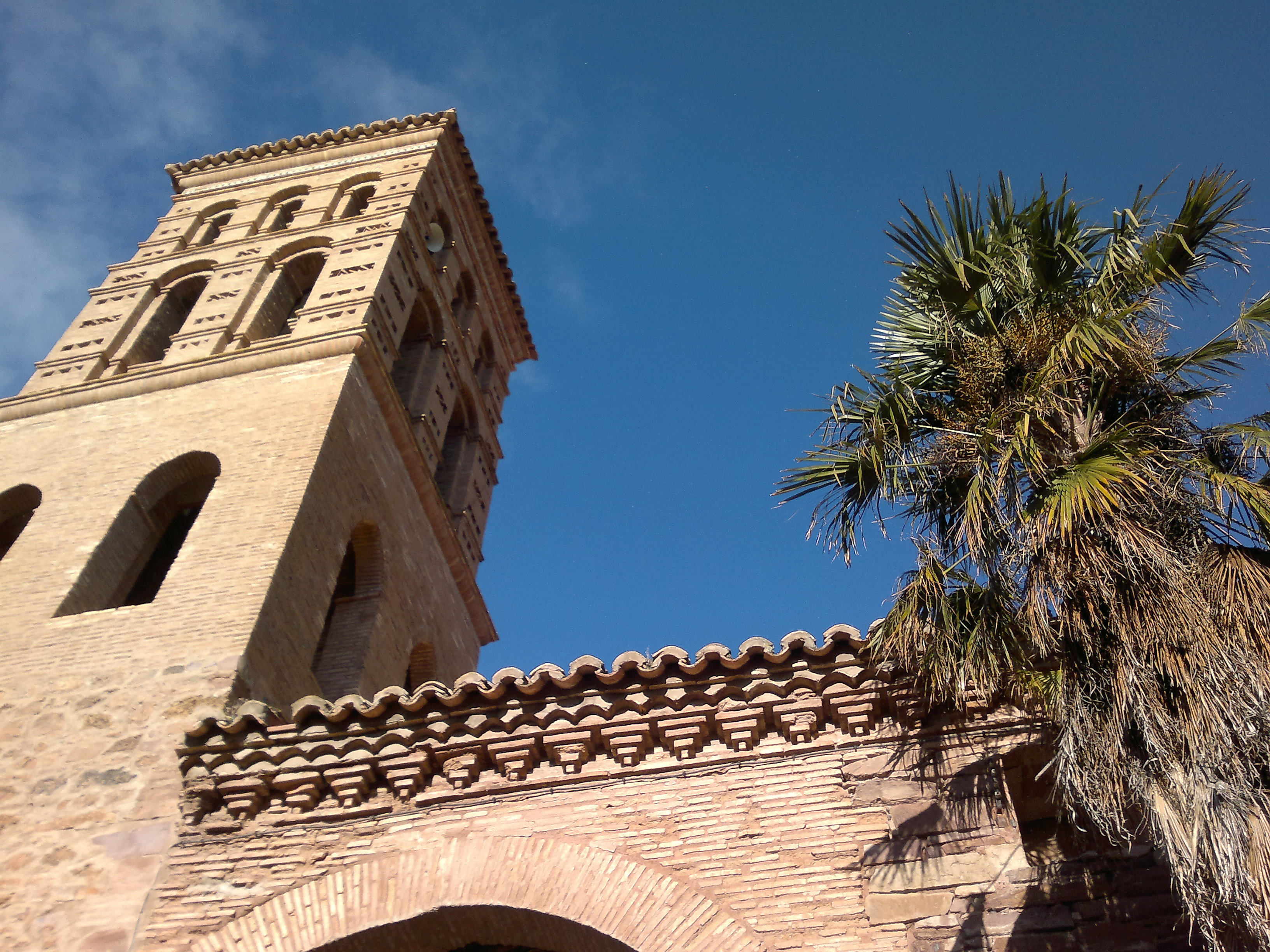 Iglesia de Calcena, Zaragoza